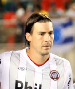 Vor dem Anpfiff der Partie zwischen Rio Branco und Atlético Paranaense (Copa do Brasil, 23. Februar 2011)